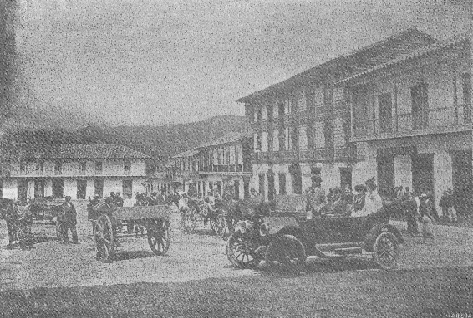 Costado sur de la Plaza de Ruíz en Sonsón, en 1917